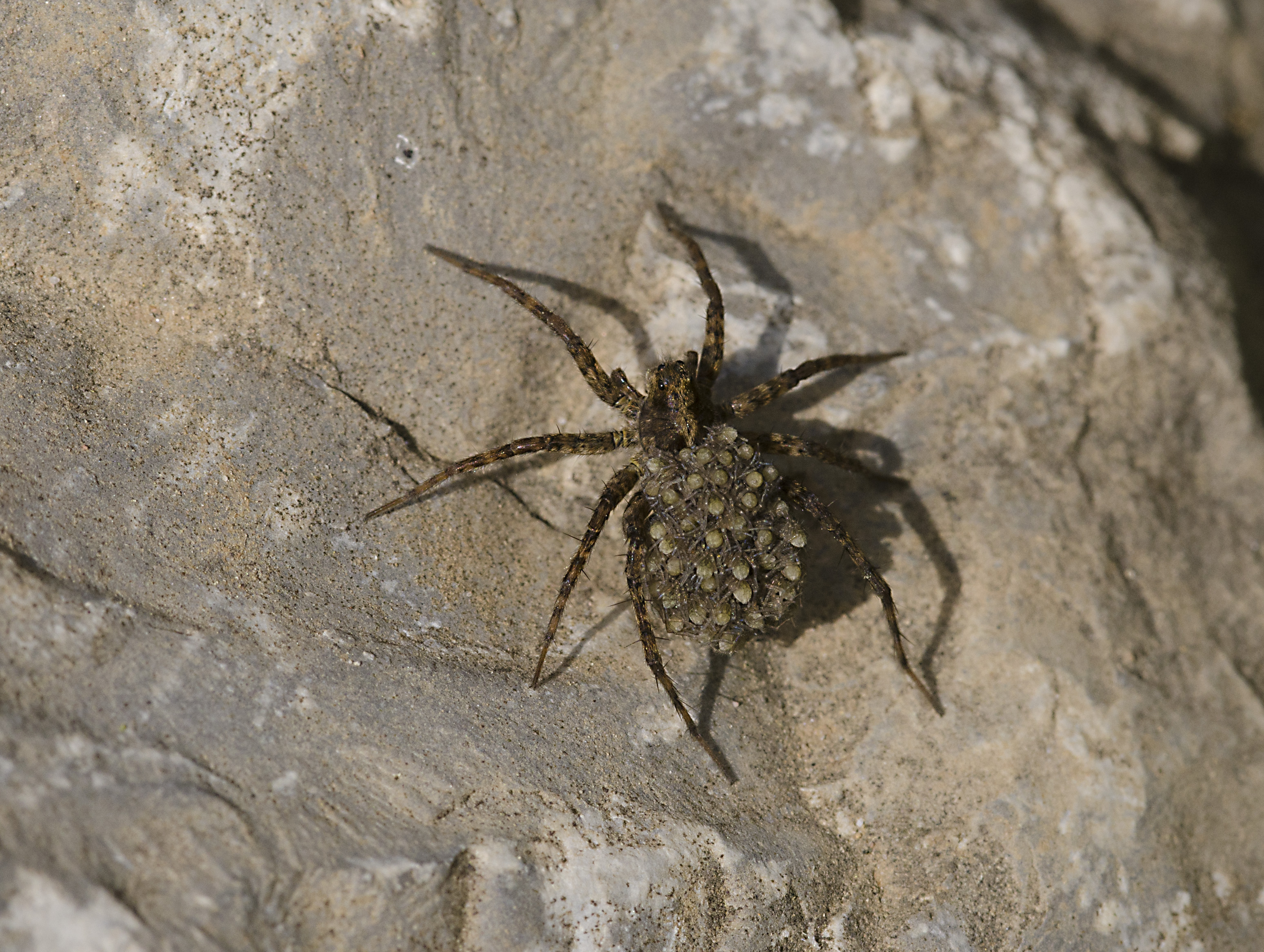 Pardosa amentata. Picture taken near Stuttgart, Germany